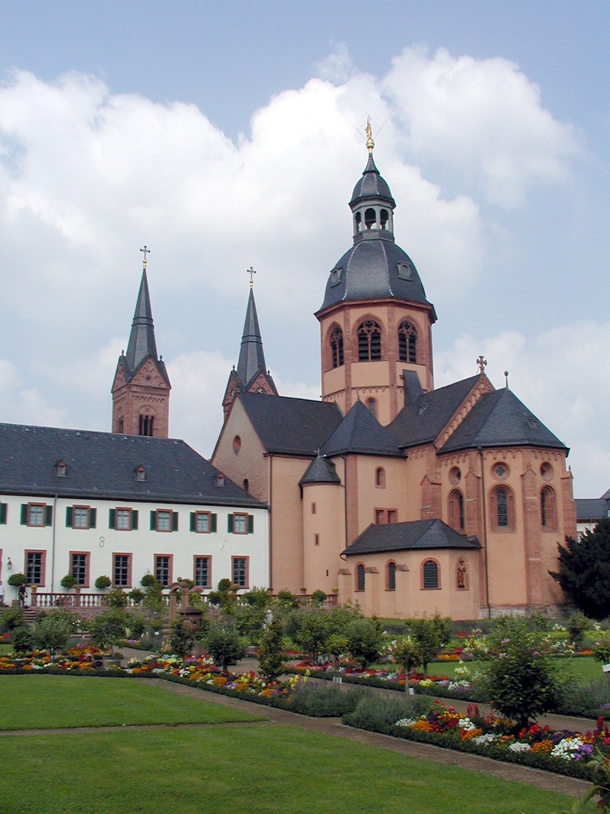 Noch ein Blick auf Einhard-Basilika